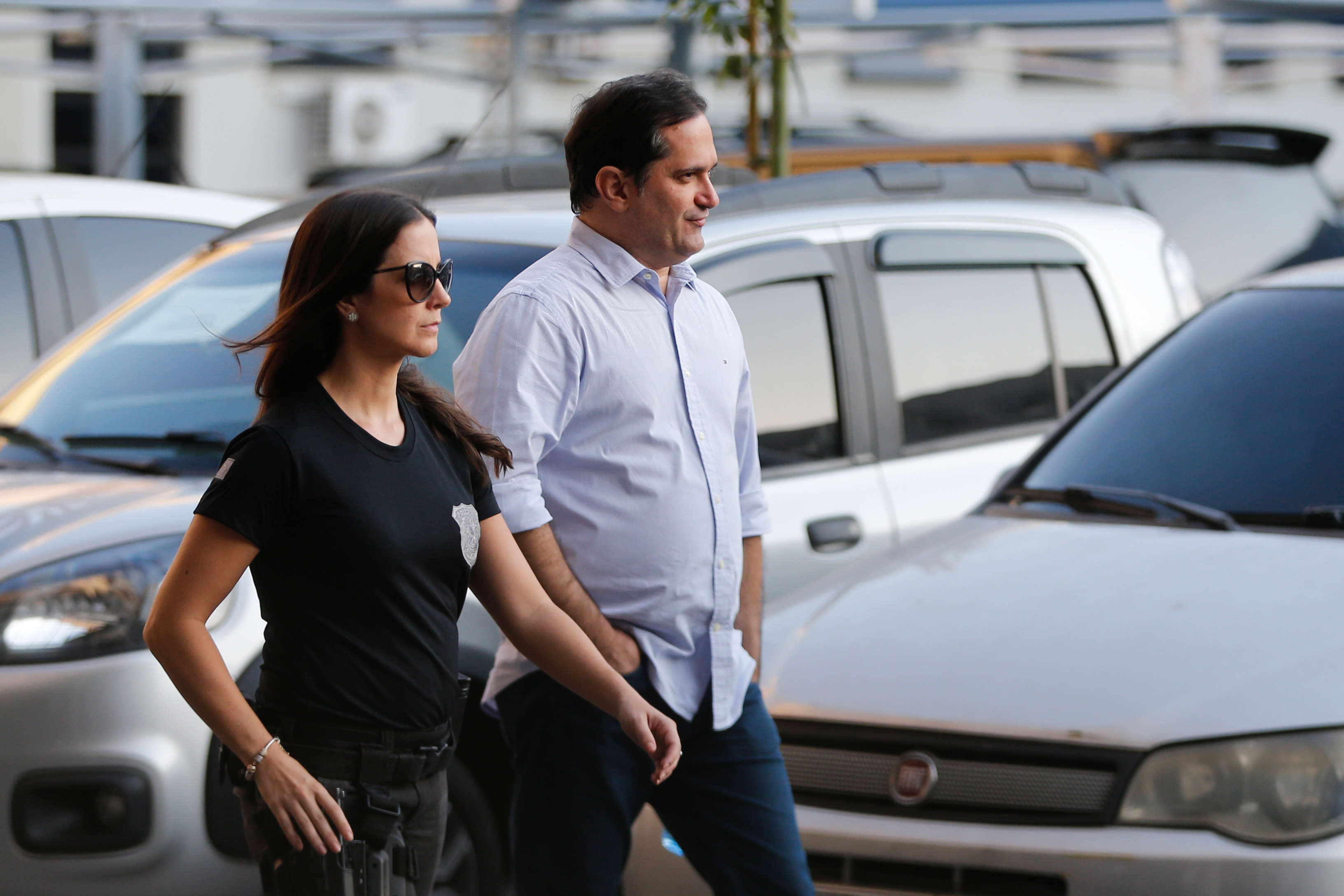 Rio de Janeiro - O deputado estadual Edson Albertassi se entrega à Polícia Federal após ter prisão decretada pelo TRF (Fernando Frazão/Agência Brasil)